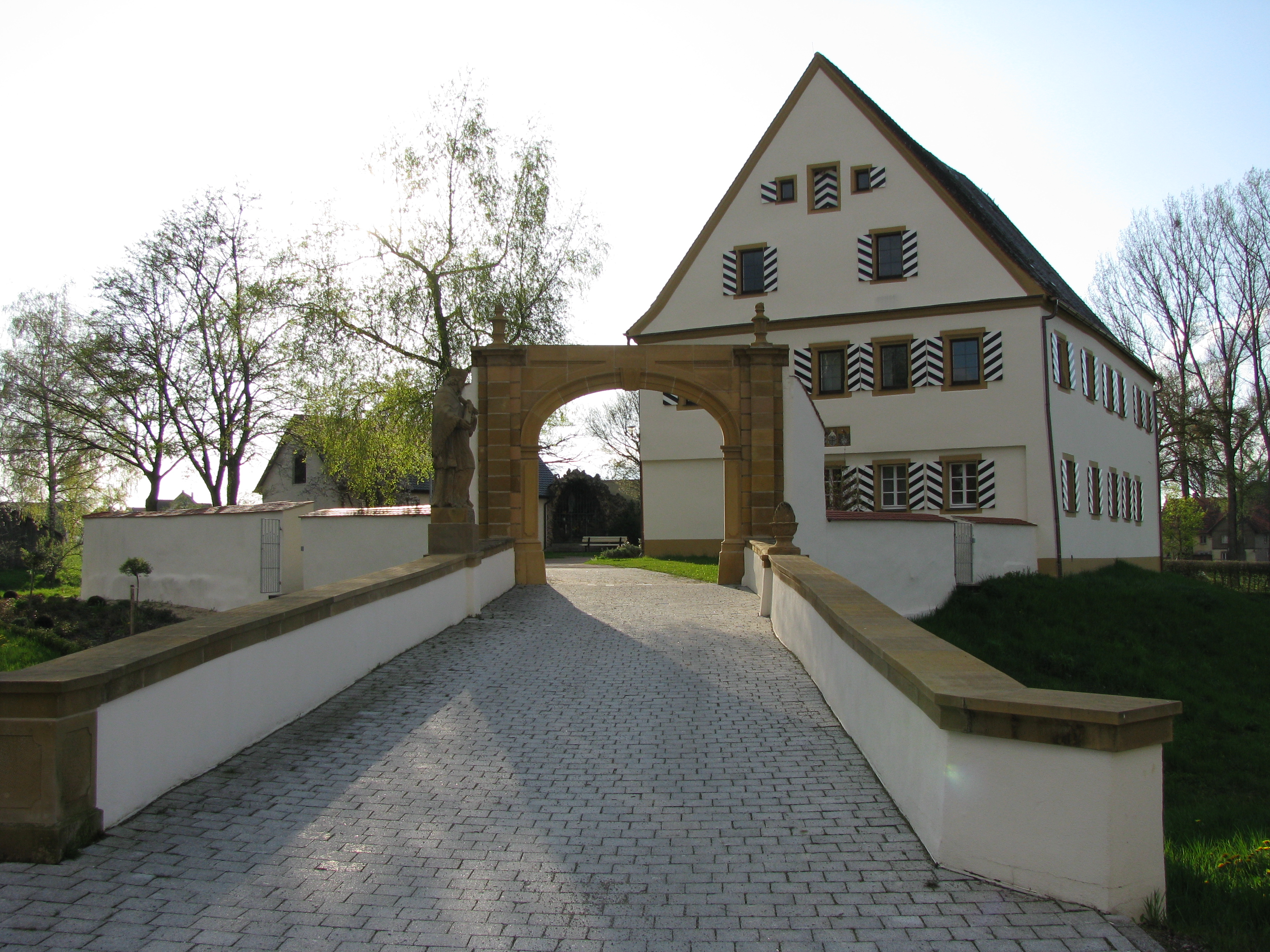 Schloss Unterschneidheim (Rathaus)